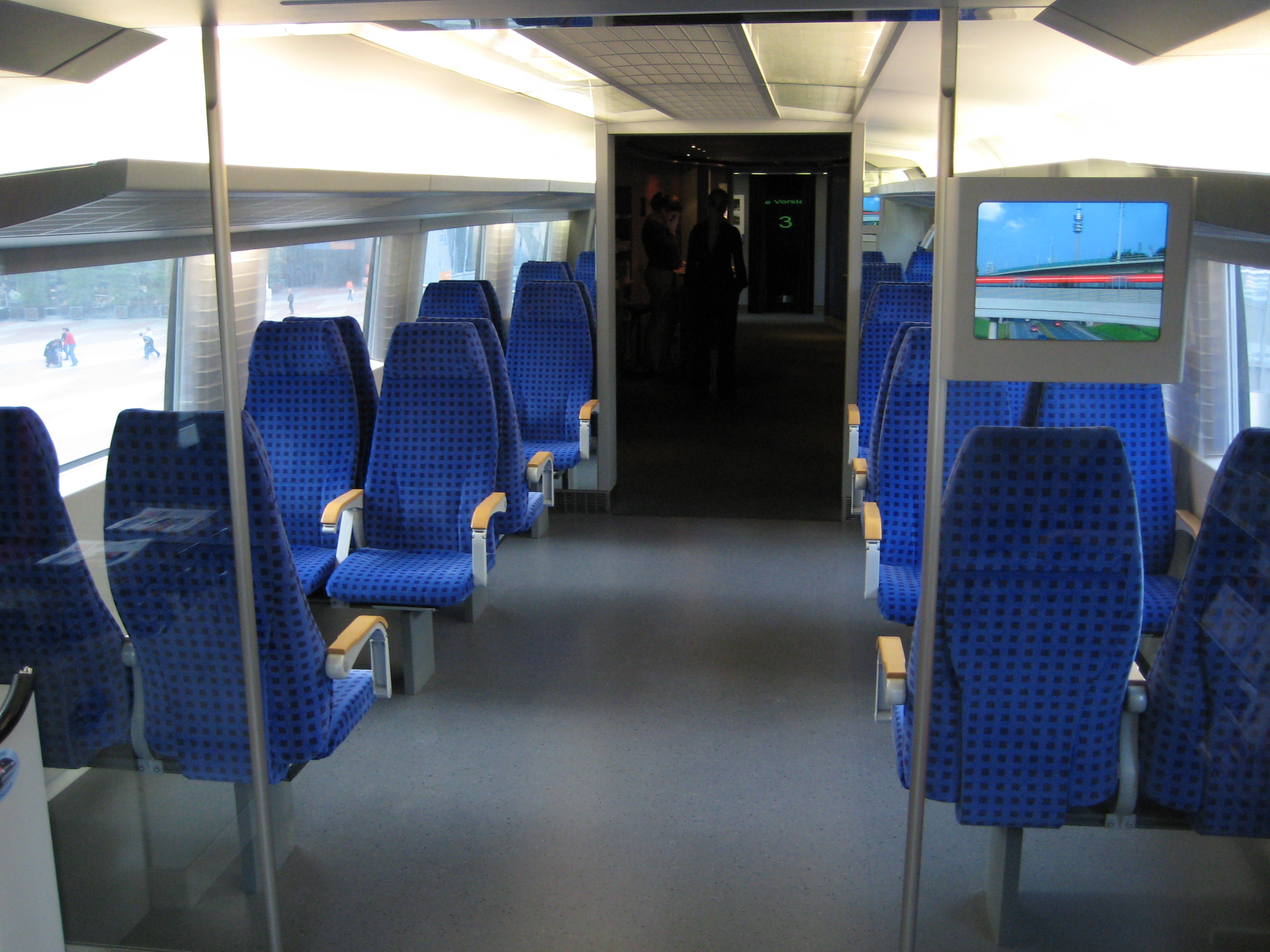 Das Innere des auf dem Flughafen München ausgestellten “Transrapid München”